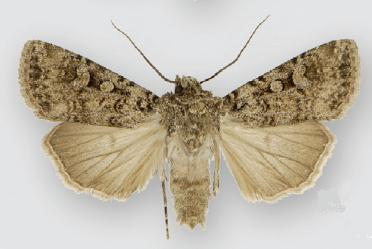 Euxoa simulata male